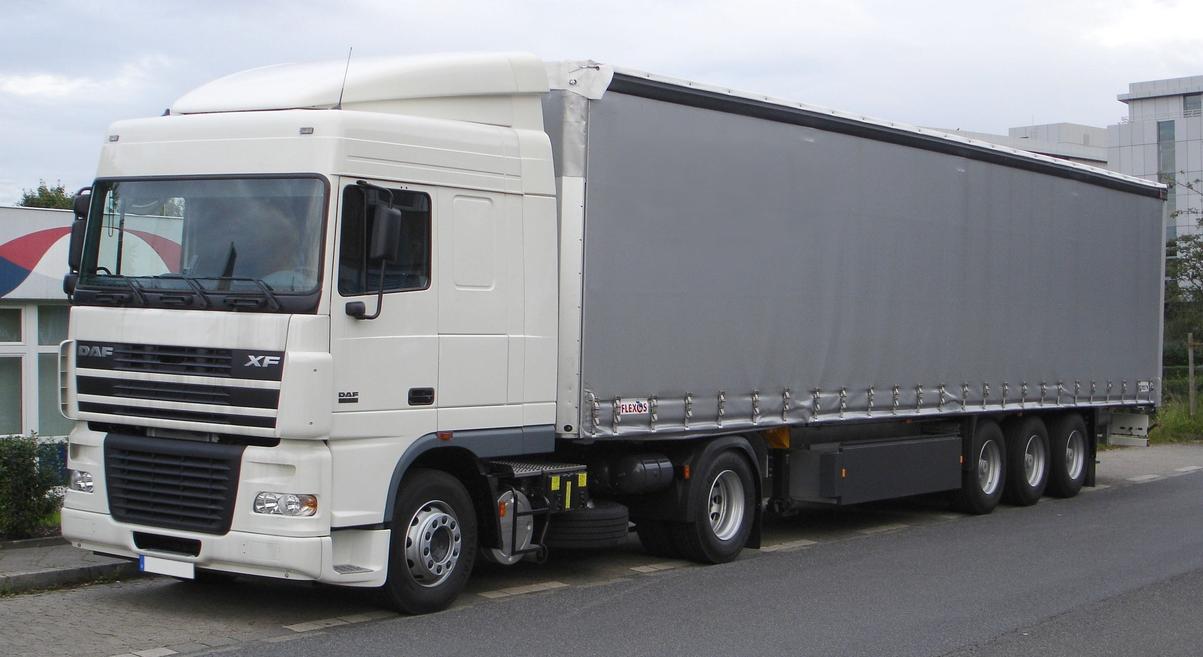 DAF XF95 Gardinenplanensattelzug